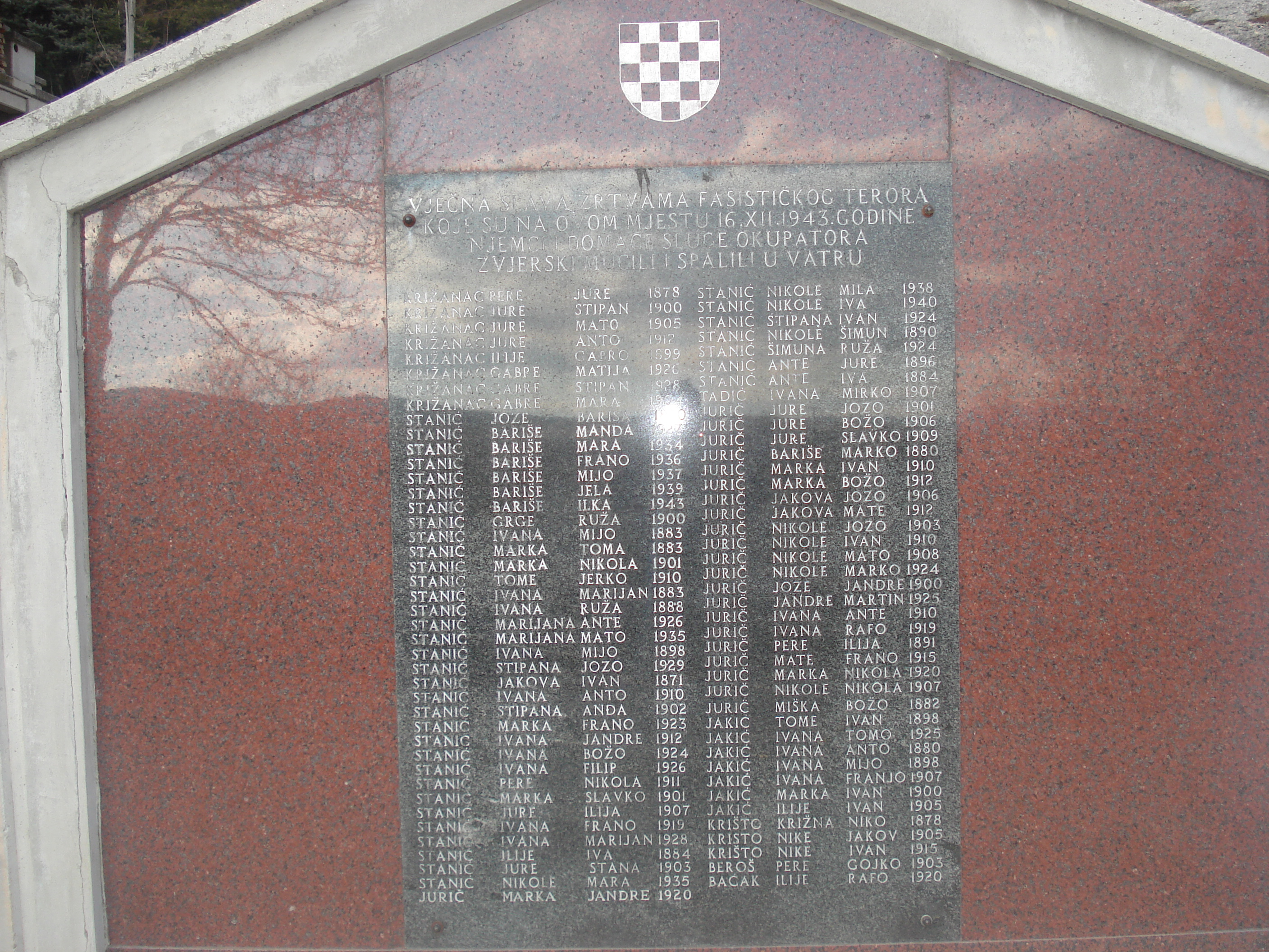 Spomenik stradalim žrtvama na Lugu